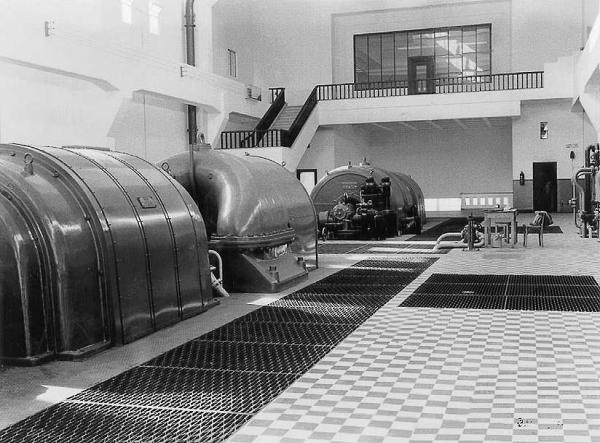 אולם הטורבינות בתחנת הכוח רדינג א' , 1939. בתחילה שתי טורבינות בהספק 12 מגוואט חשמל לכל טורבינה